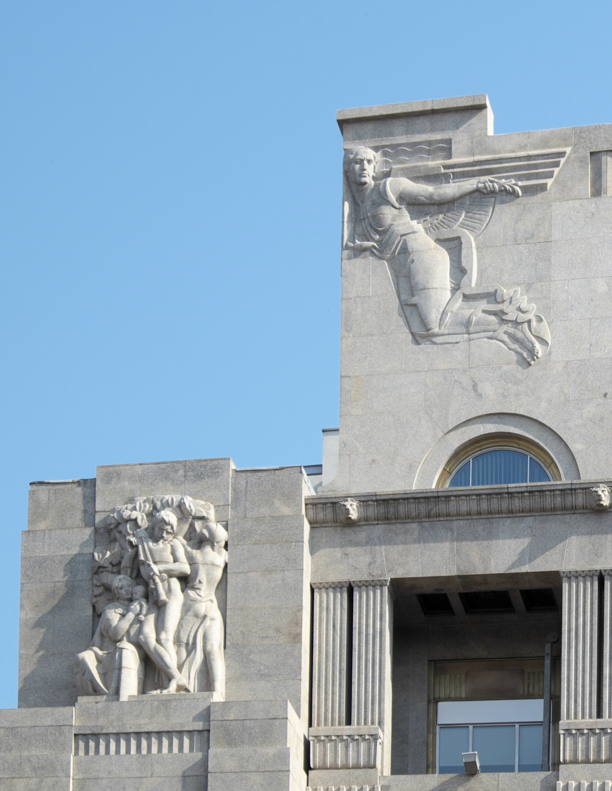 Gebäude in der Calle de Alcalá Nr. 45 in Madrid (Spanien); ehemals Banco de Vizcaya, heute Büros der Stadtverwaltung von Madrid; 1930-1934 errichtet, Architekten: Manuel Ignacio Galíndez Zabala, Fernando Arzadún Ibarraren, Julián Arzadún, Skulpturen von José Capuz und Juan Adsuara